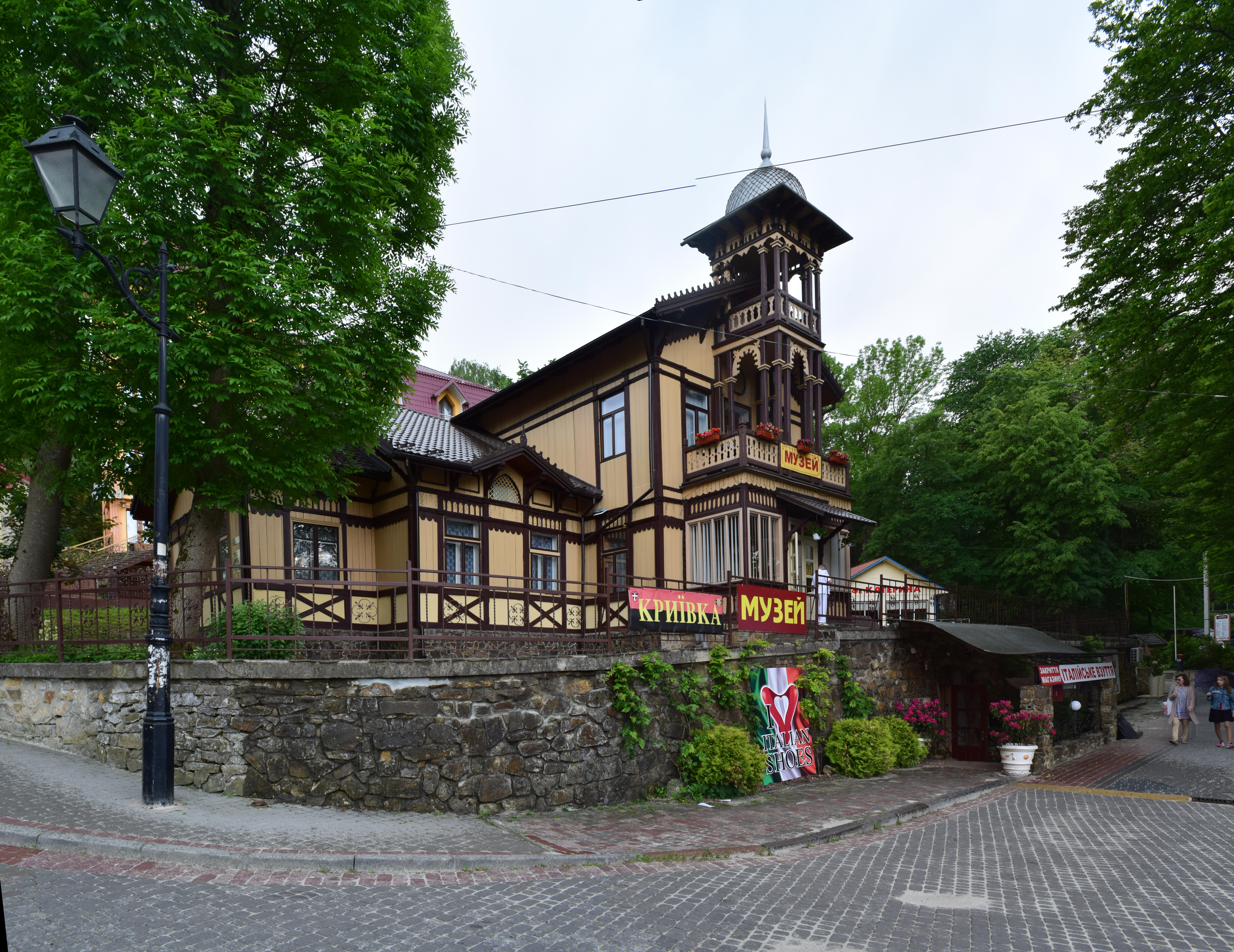 Вілла «Сіріус», Трускавець, майдан Січових Стрільців, 2